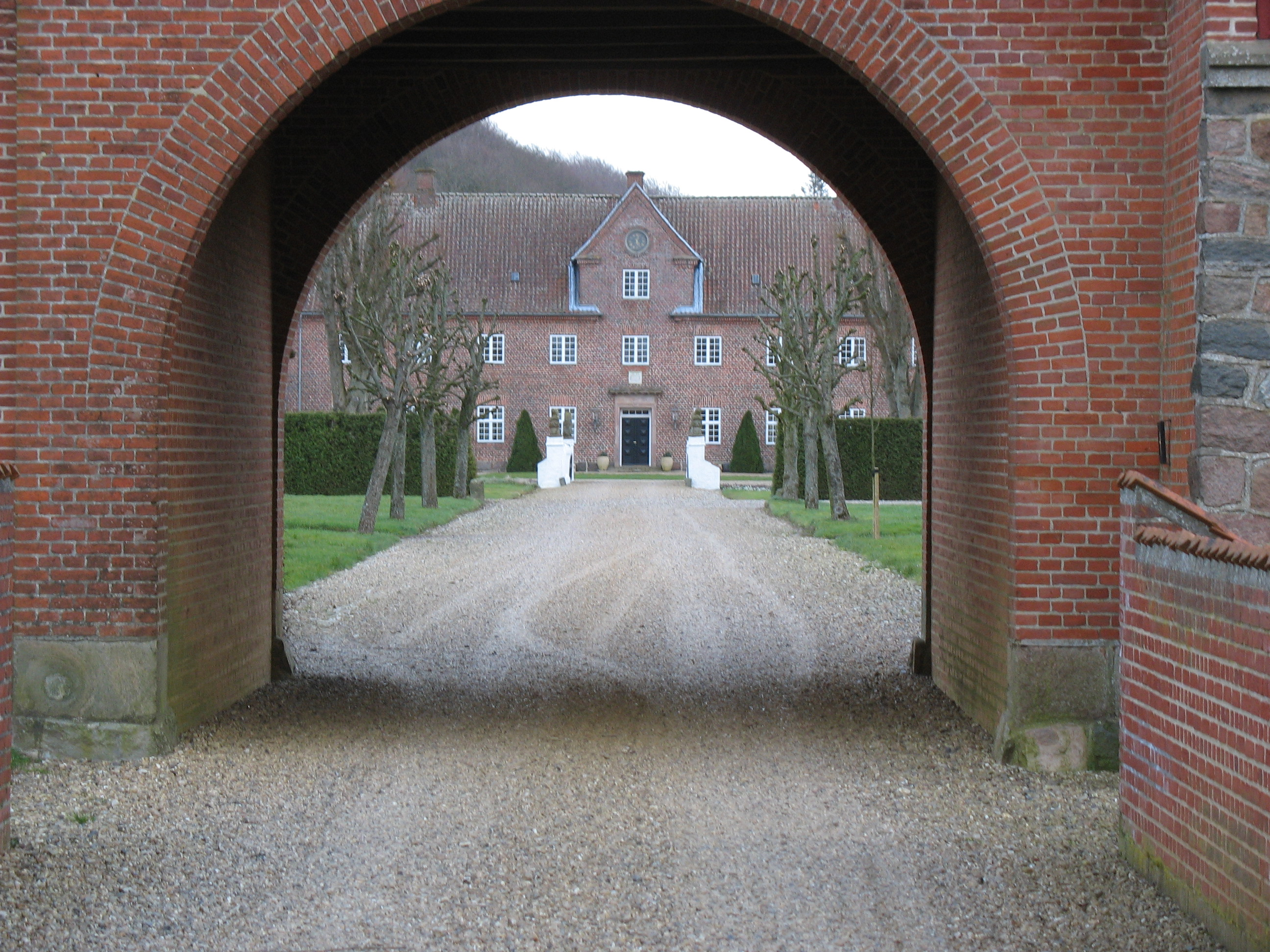 Palstrup Herregård ved Rødkærsbro